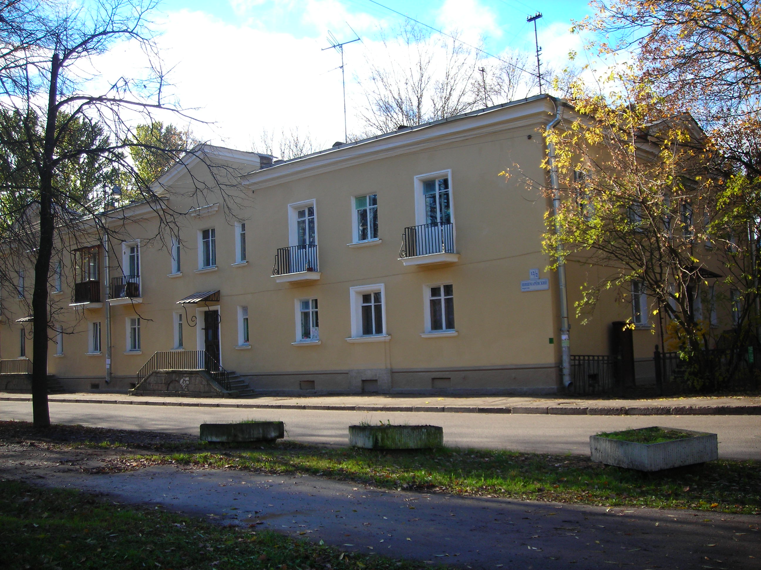 Shismaryovsky pereulok, Spb